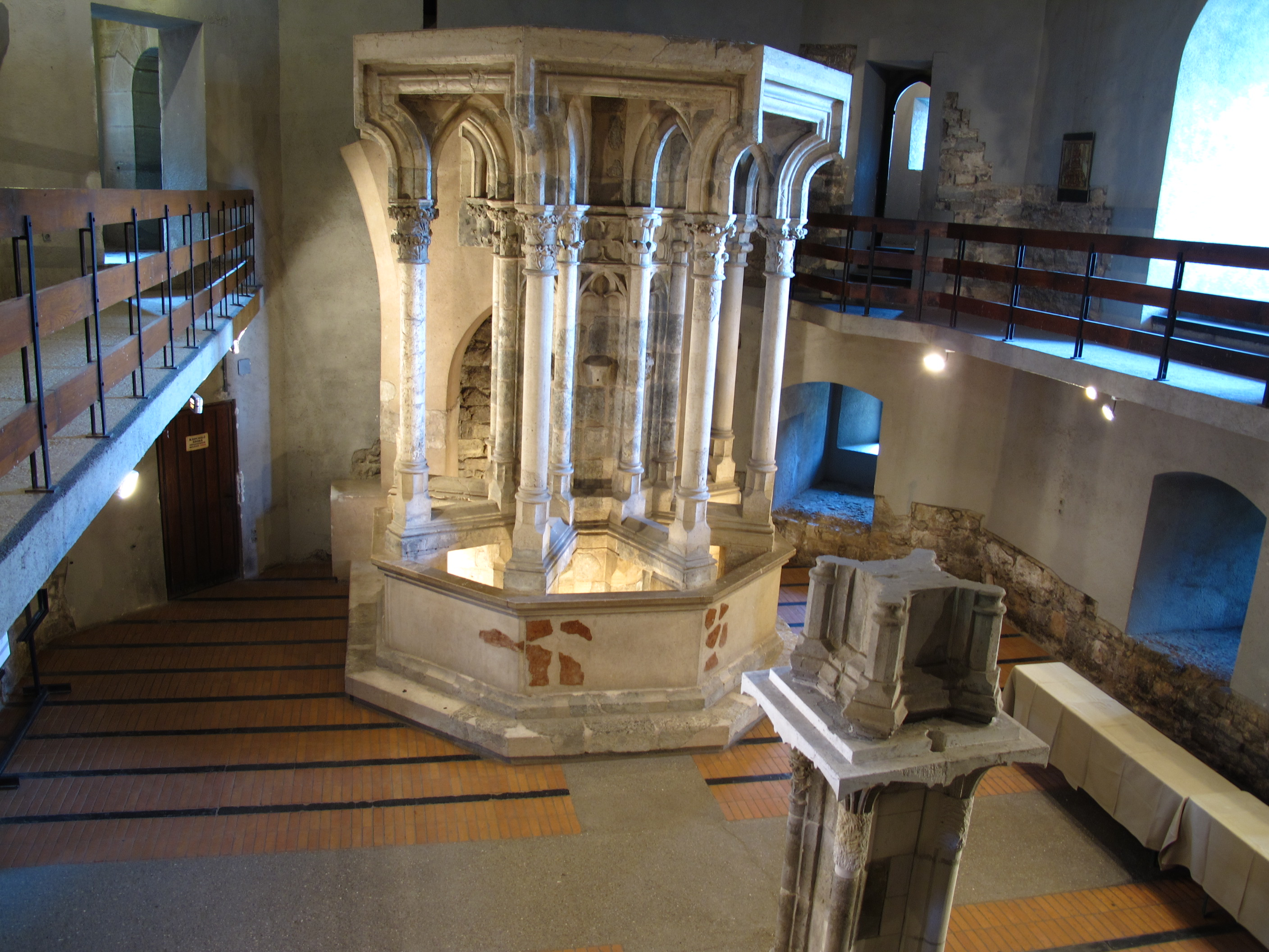 Alsóvár (Salamon-torony) This is a photo of a monument in Hungary. Identifier: 7606